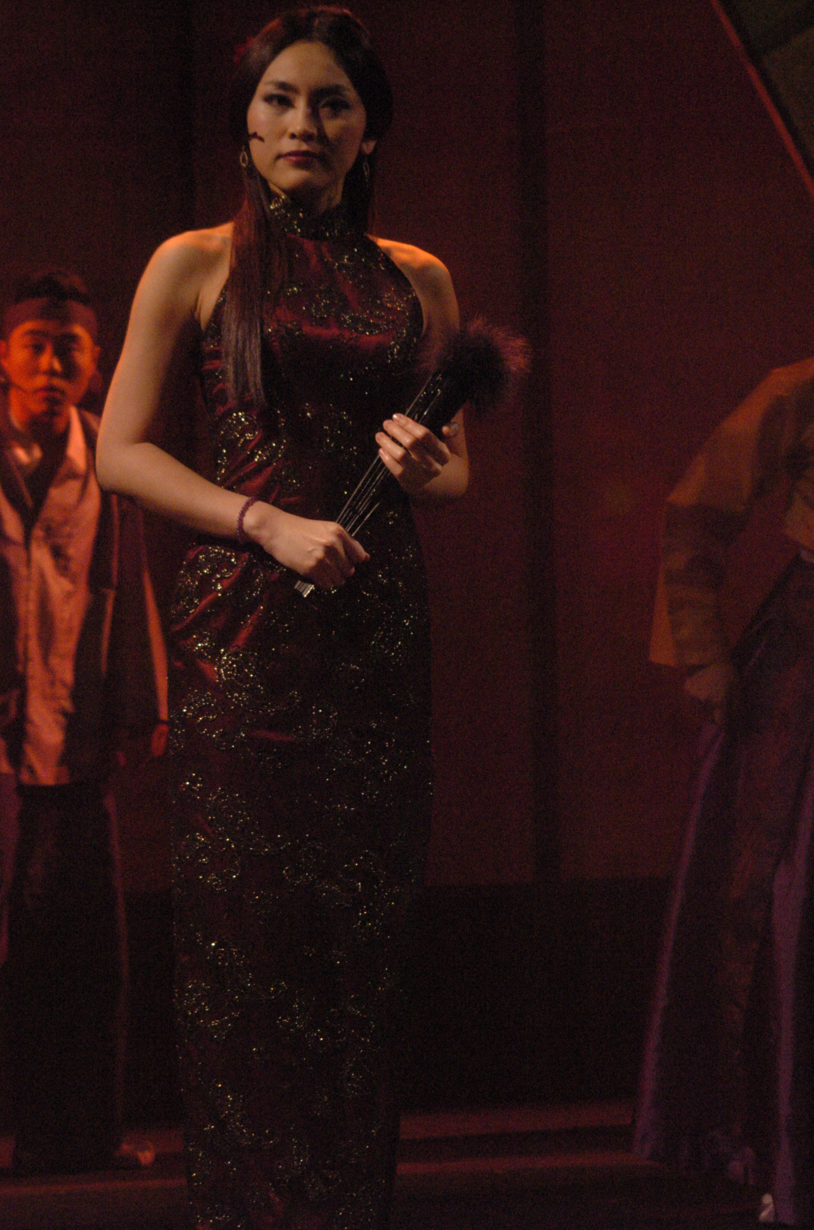 날아라박씨